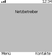 Schema einer Handy-Anzeige / Scheme of a displaying mobile